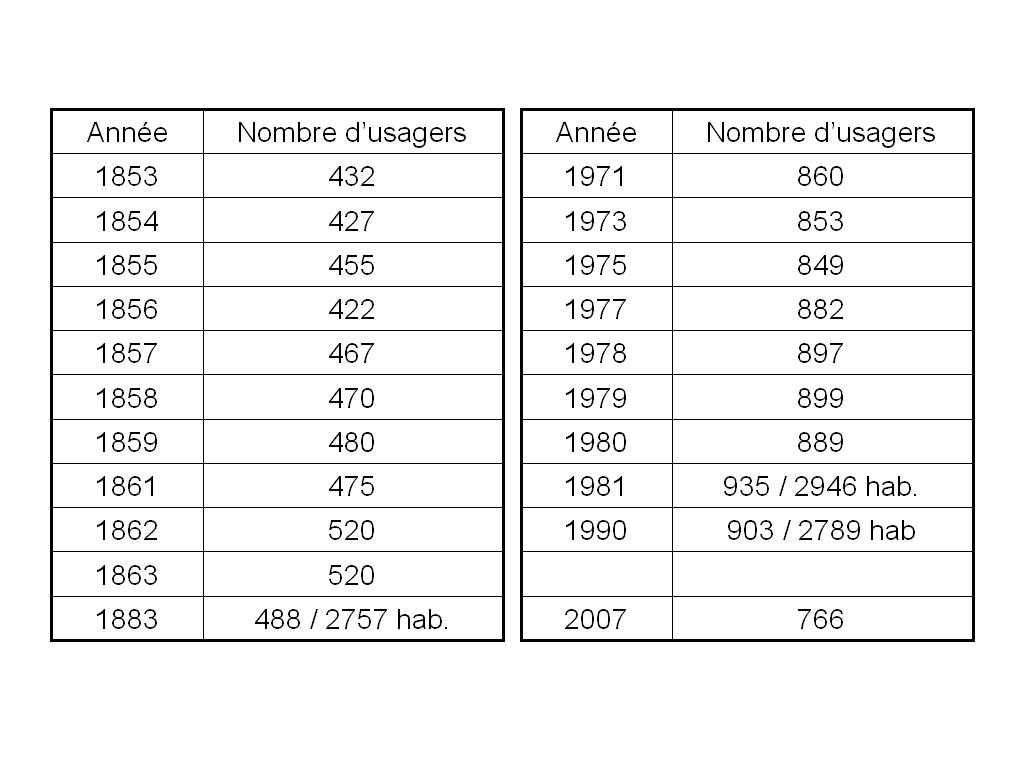 Tableau des usagers du bois Bourgeois